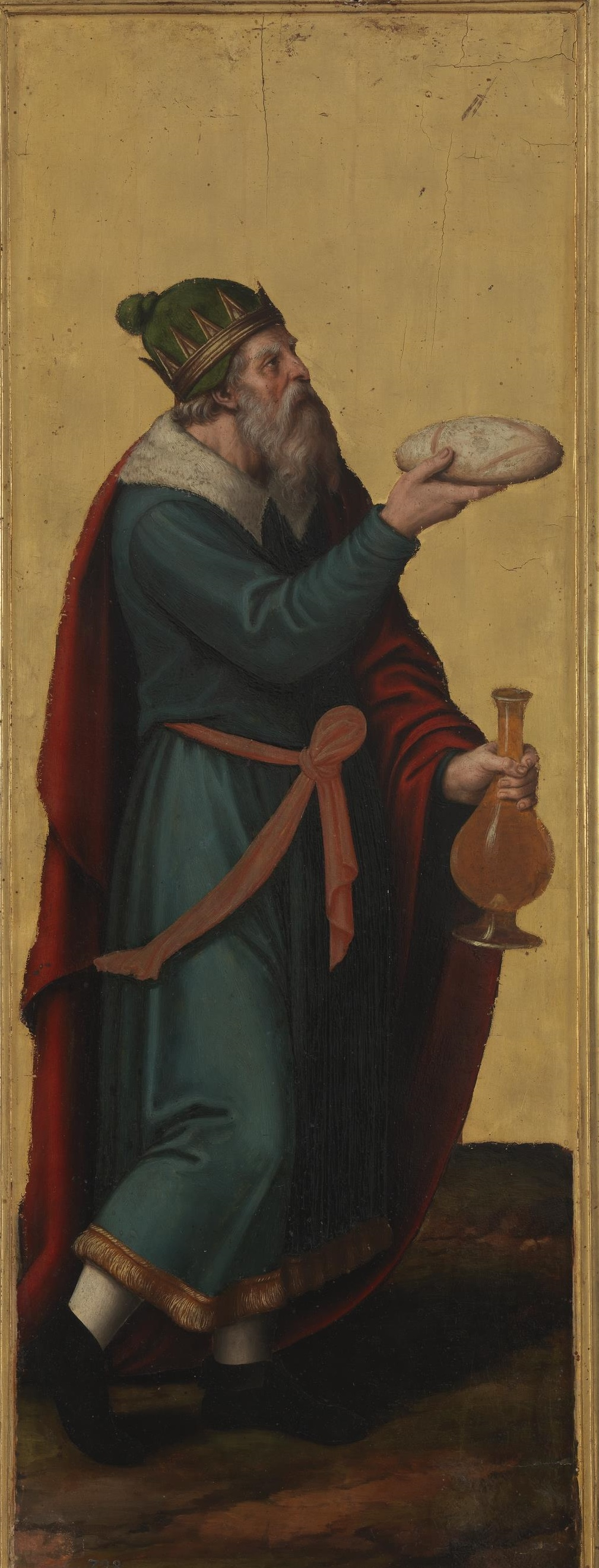 La obra representa al sumo sacerdote Melquisedec, rey de Salem y mencionado en el Libro del Génesis, y formó parte del tabernáculo del retablo mayor de la iglesia de la Natividad de la Virgen del municipio valenciano de Fuente de la Higuera..